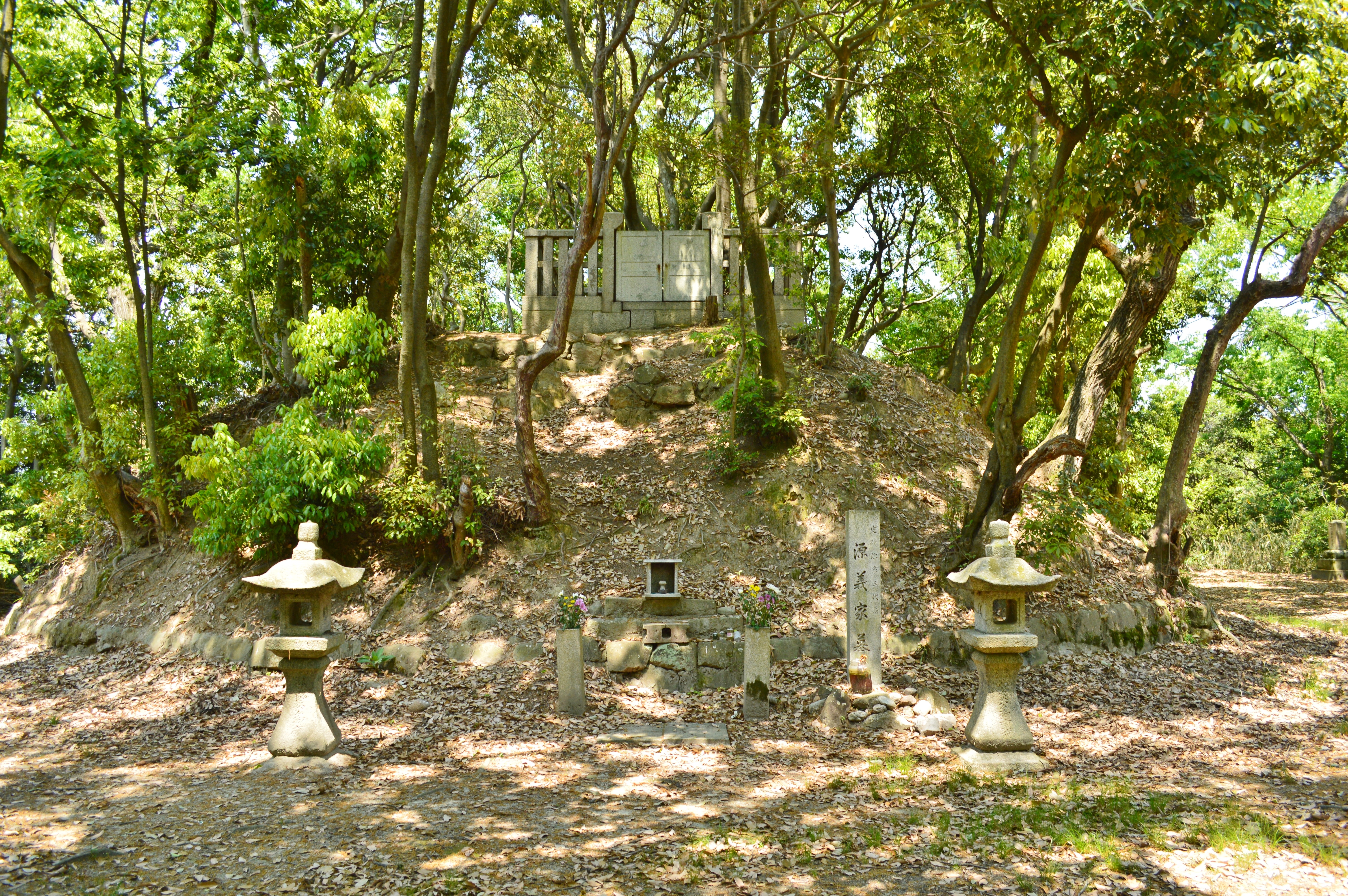 源氏三代の墓 源義家墓